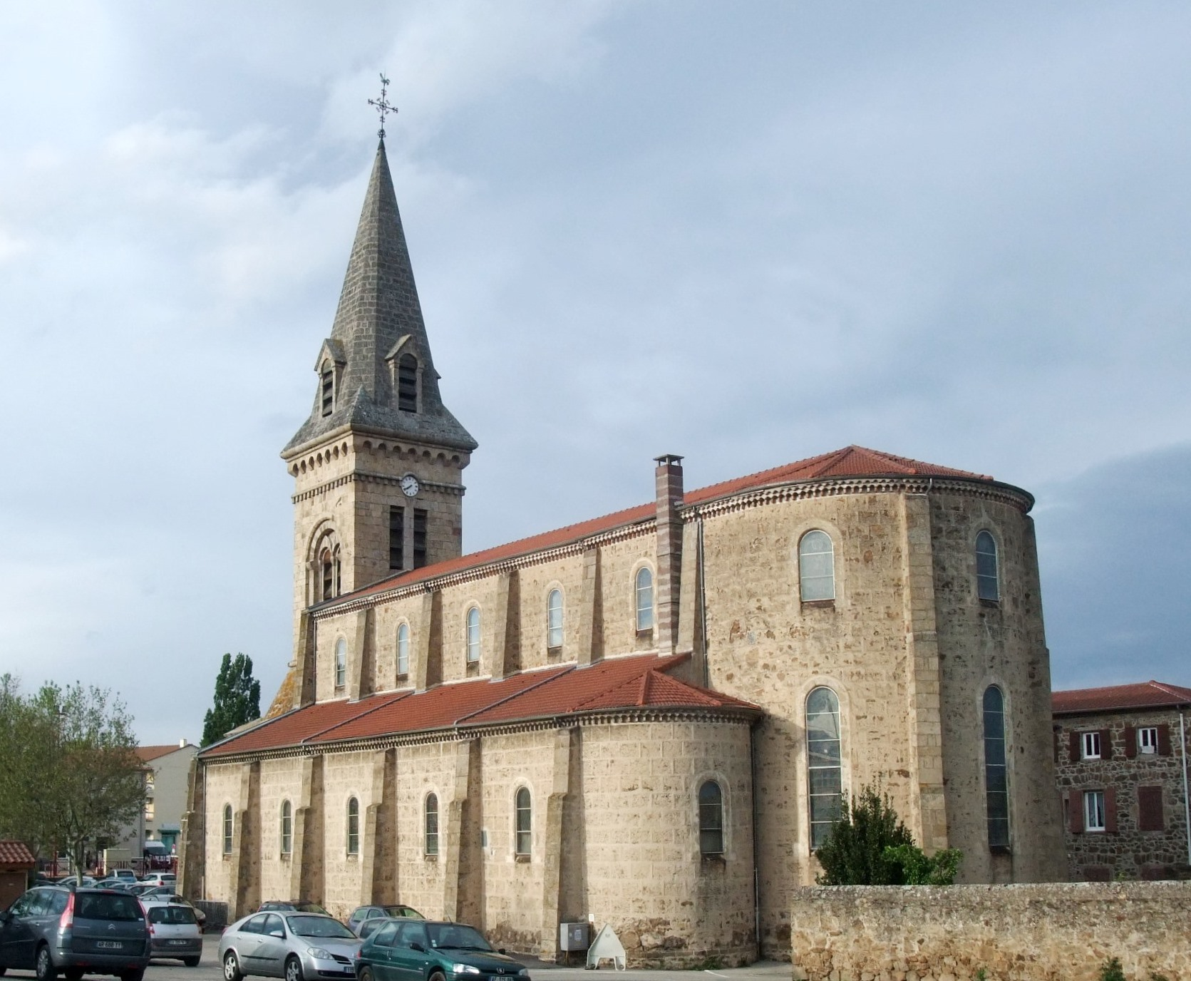 Davézieux église nouvelle